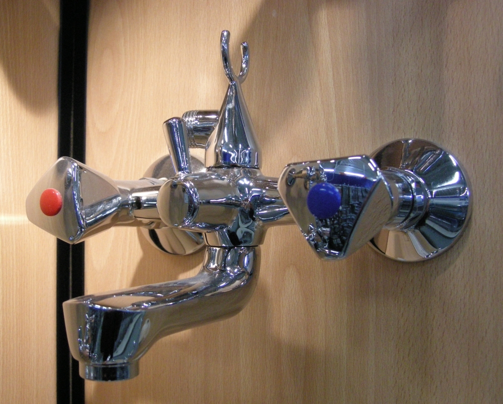 Цветовото кодиране на кранчетата за студена и топла вода показва, че цветът може да закодира значение според контекста. Пример за Визуална семиотика.